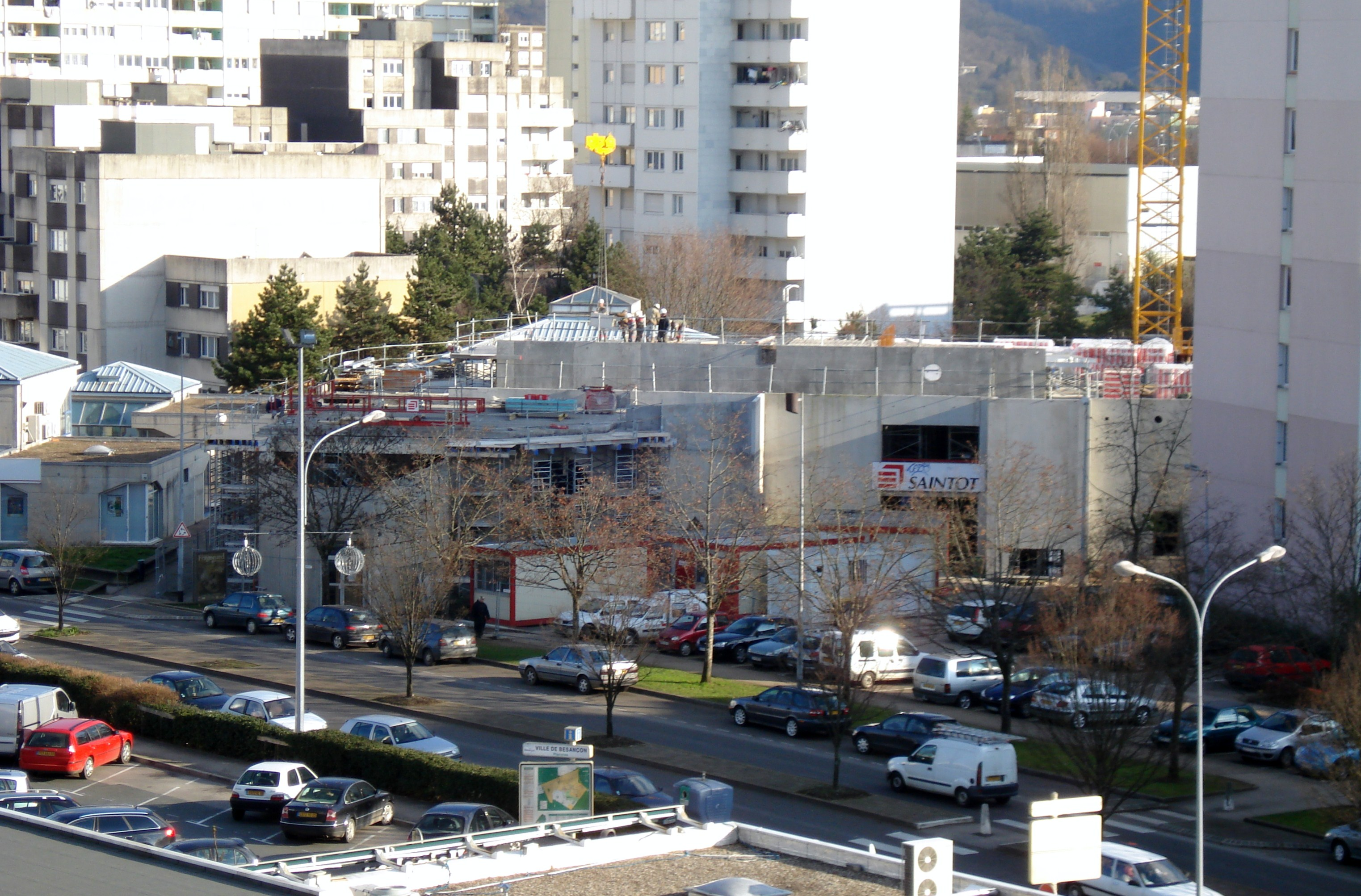 Le centre Nelson-Mandela de Planoise en construction, dans la ville de Besançon (Doubs, France).